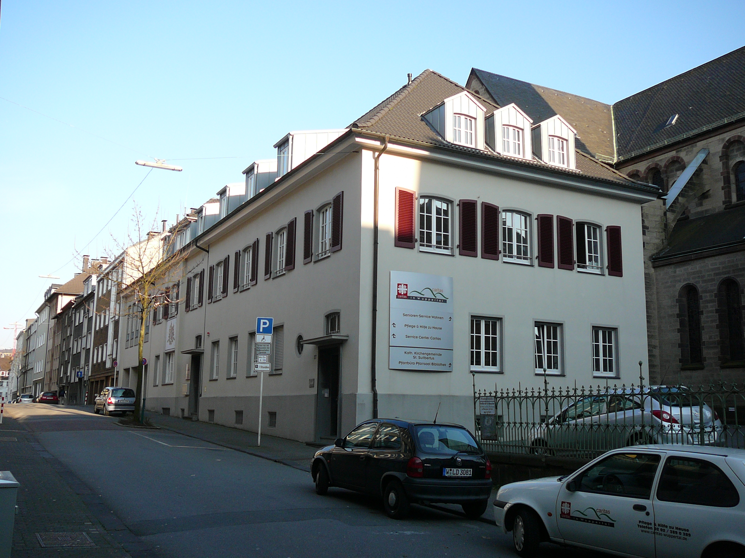 ehem. Kloster St. Ursula (nun Caritas-Altenpflegeheim), Chlodwigstraße, Wuppertal